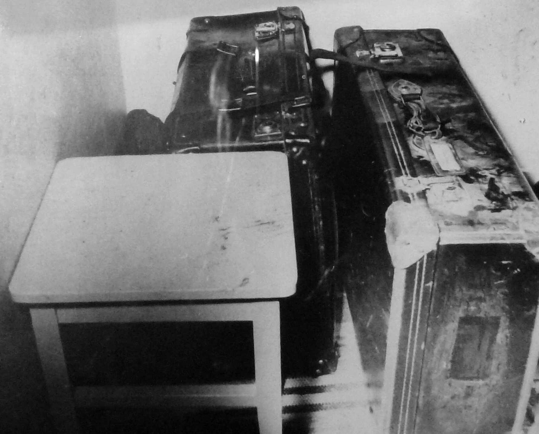 Styckmordet Bagarmossen 1954, resväskor